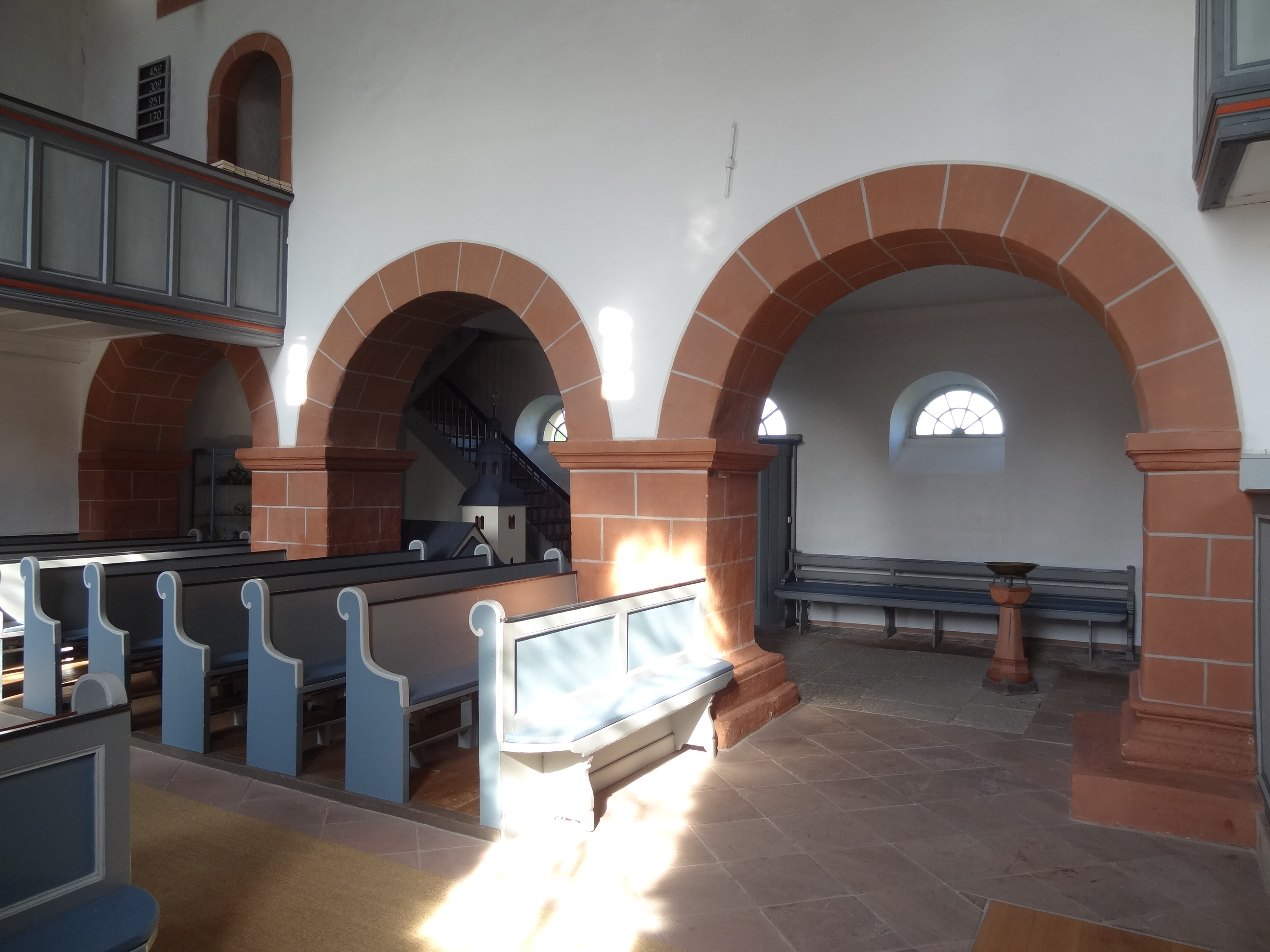 Evangelische Pfarrkirche Trais-Münzenberg